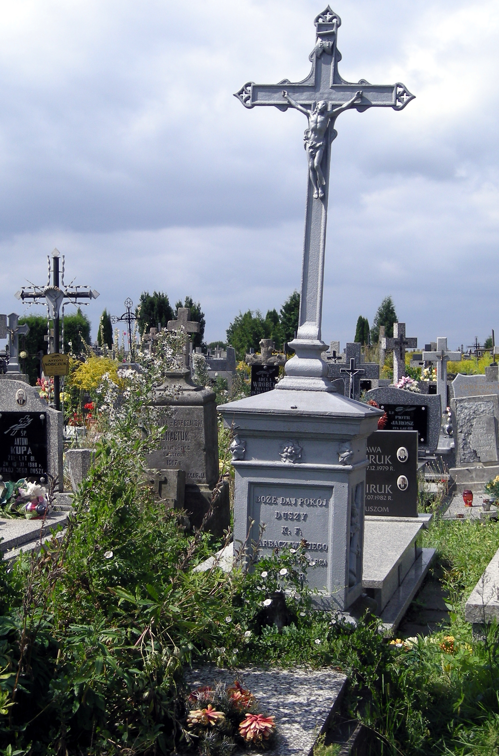 Nagrobek ks. Franciszka Garbaczewskiego.